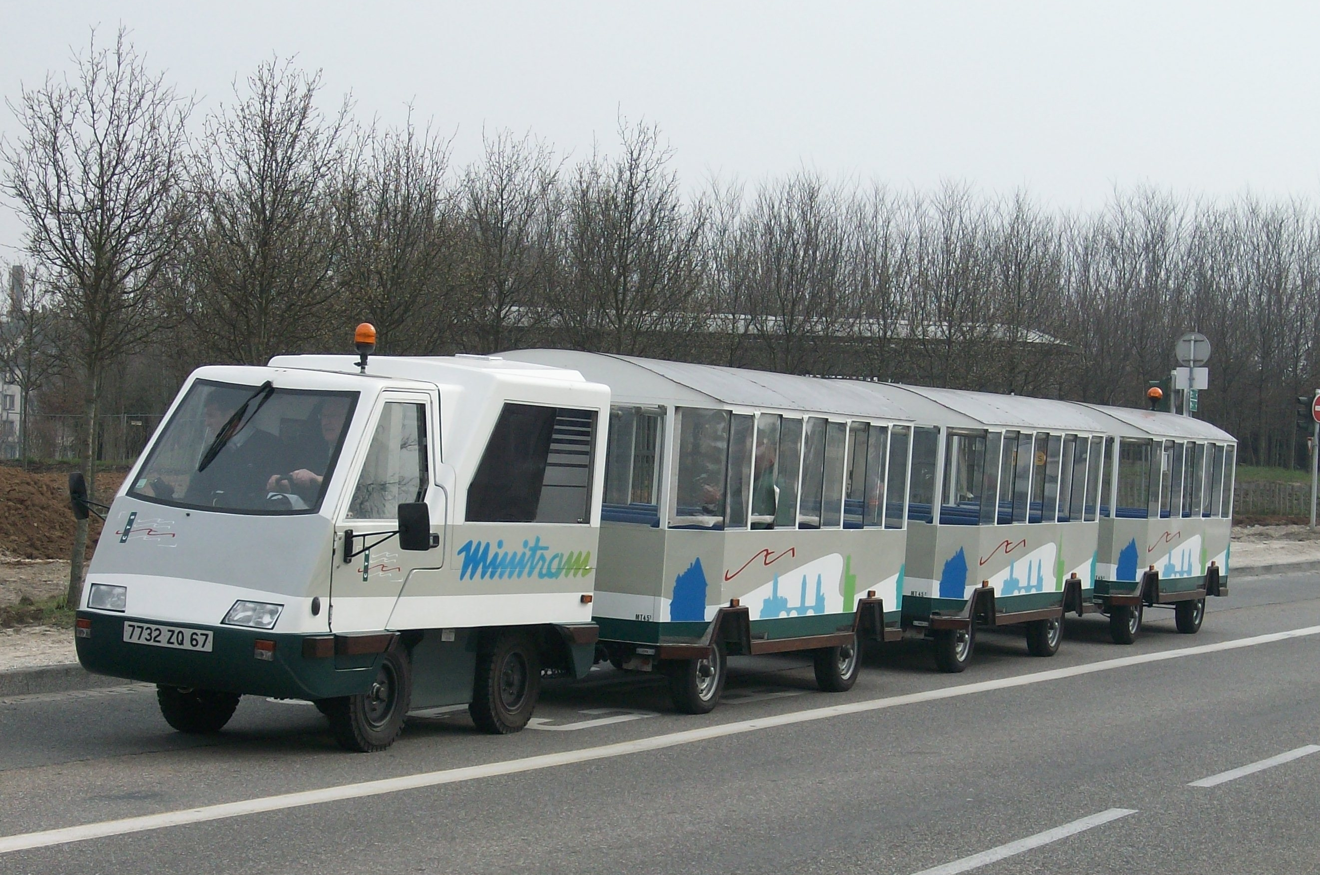 Mini tram éléctrique touristique longeant la place de l'étoile à Strasbourg